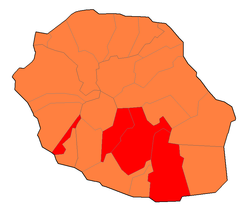 Carte de la Réunion permettant de localiser les communes de la CCSUD.